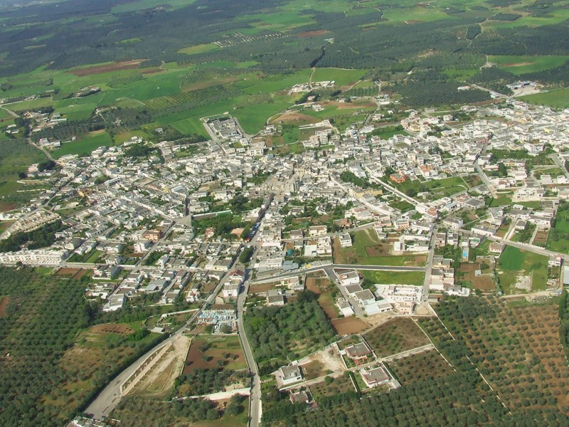 Giurdignano vista dall'alto